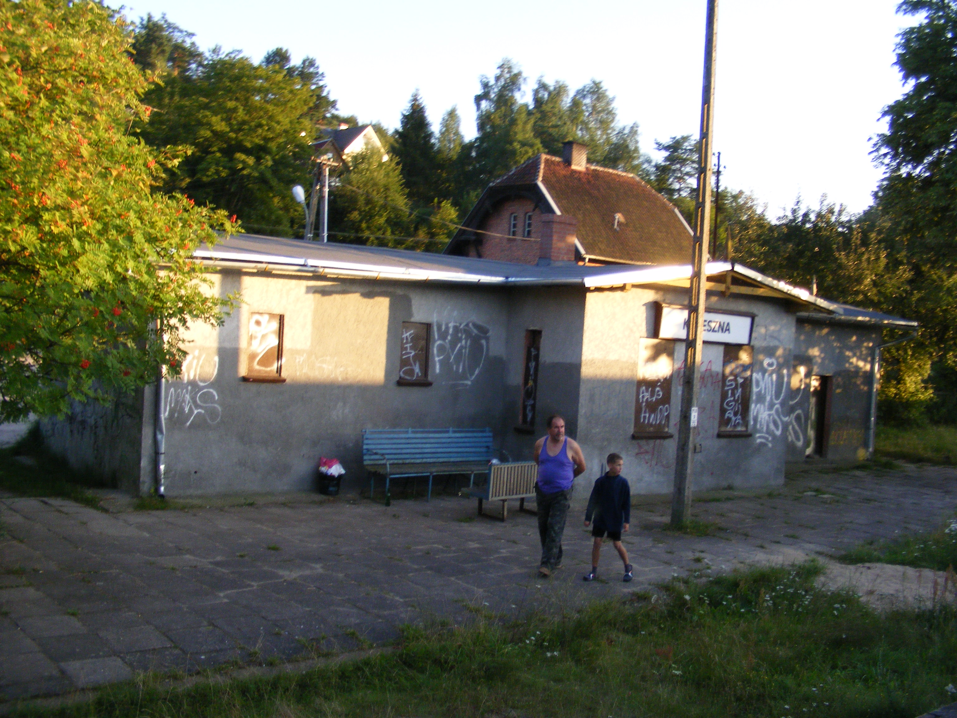 Przystanek kolejowy Krzeszna (woj. pomorskie)